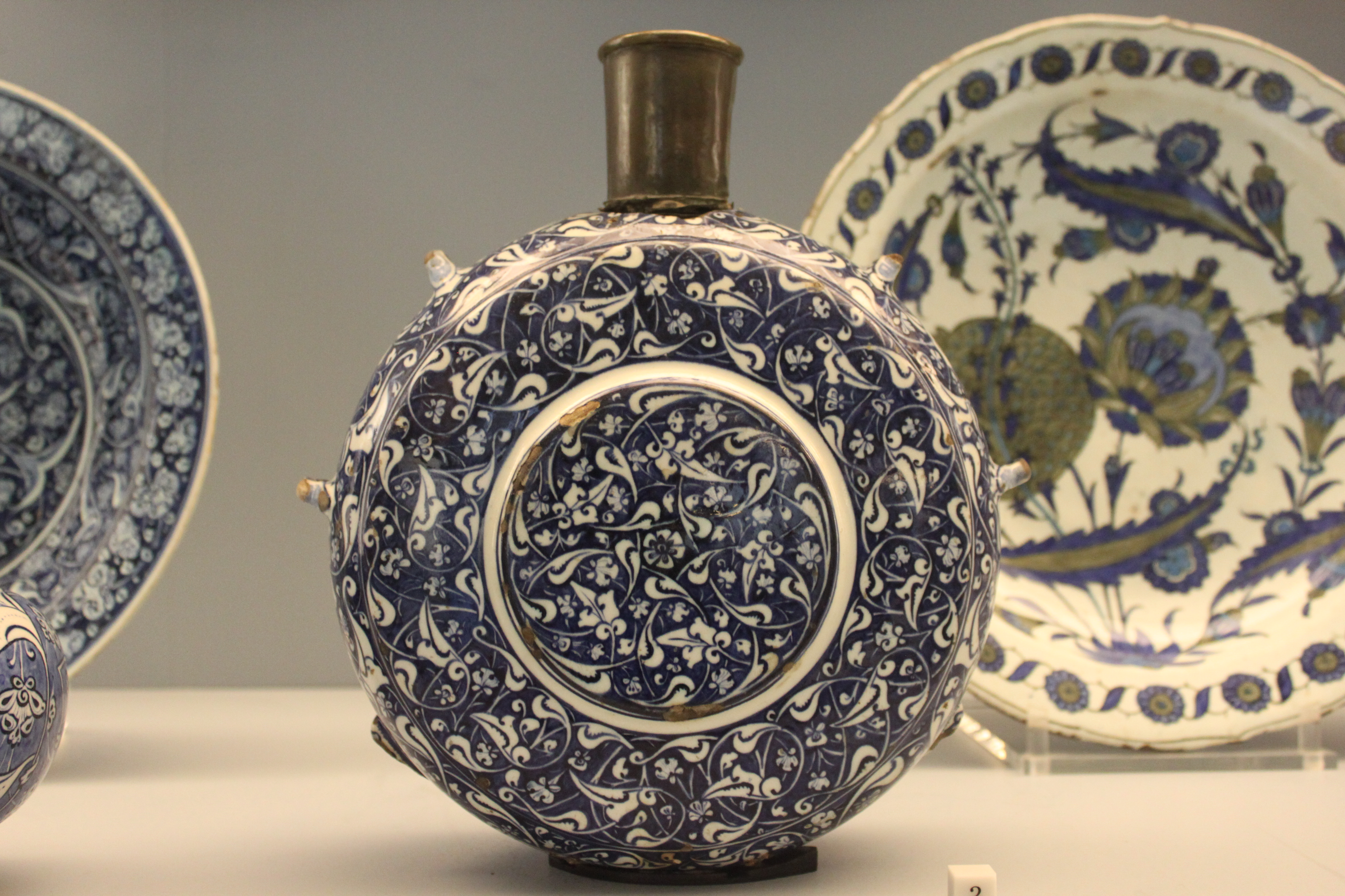 Gourde au style Baba Nakkas - vers 1480 - Iznik - Musée national de céramique - Sèvres - Inventory number 15472. On parle aussi de style "Baba Naqqash" ou "rumi hatayi". Pâte siliceuse, glaçure, décor peint